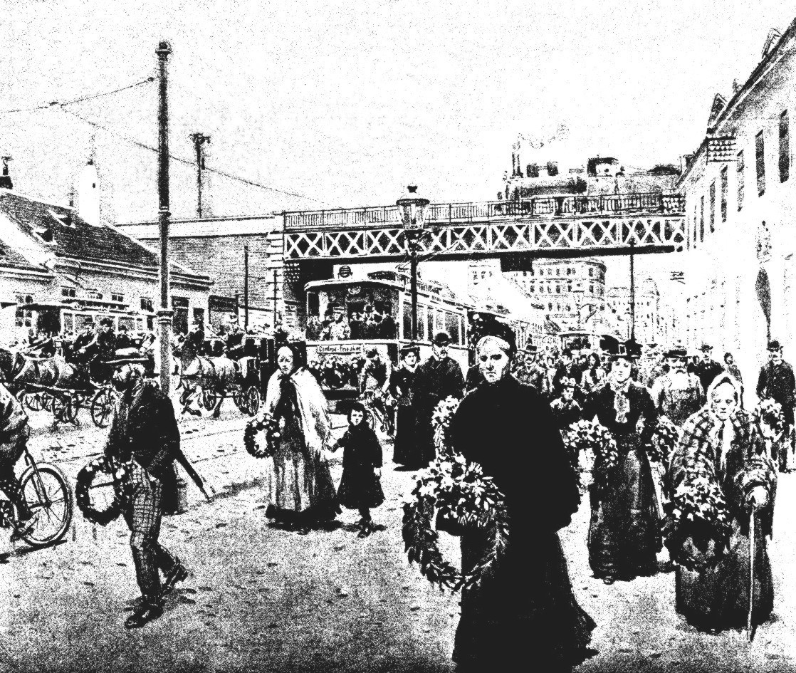 Wien, Allerseelen 1903, Weg zum Zentralfriedhof